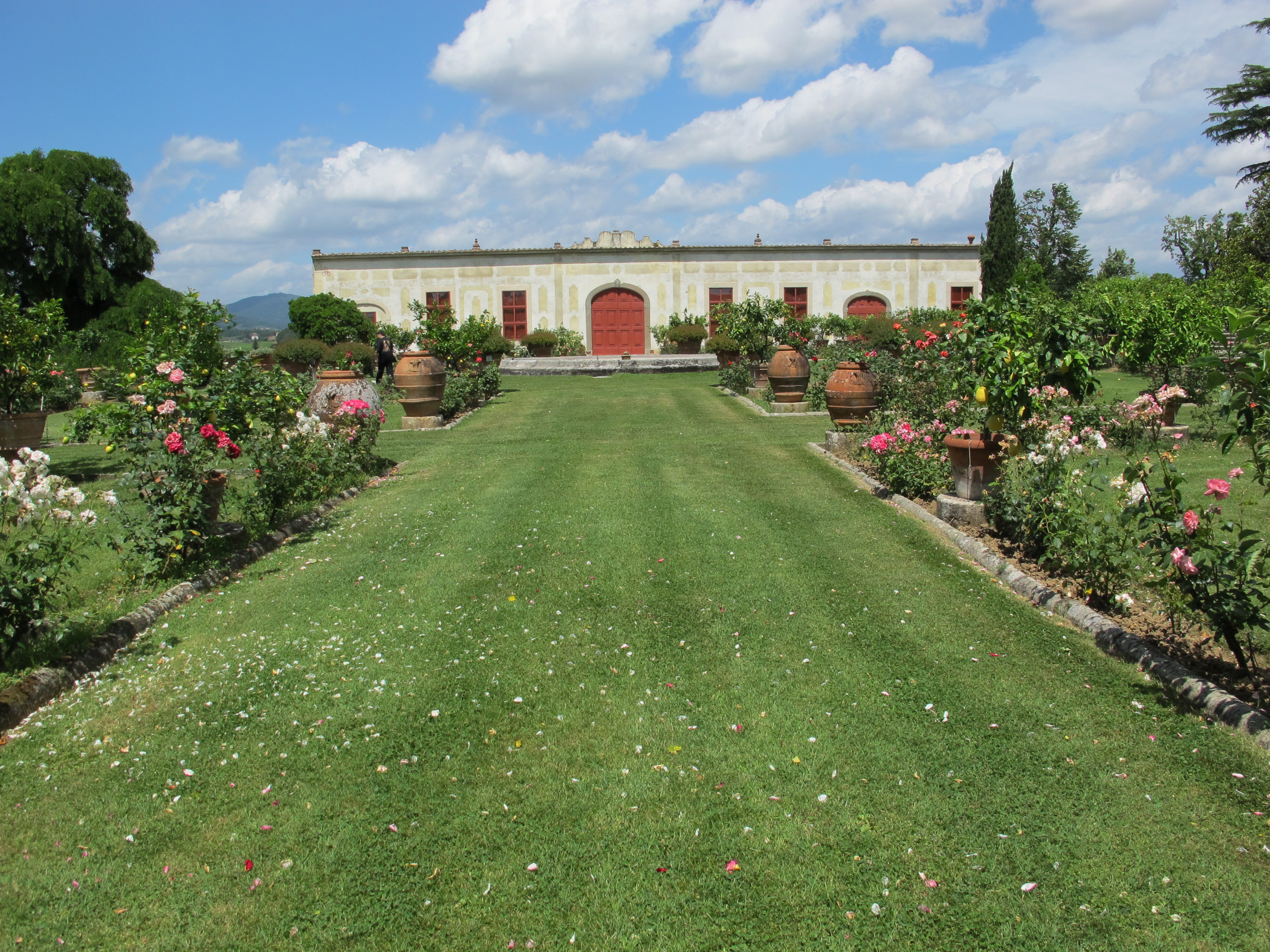 Villa la magia, giardino 17 limonaia